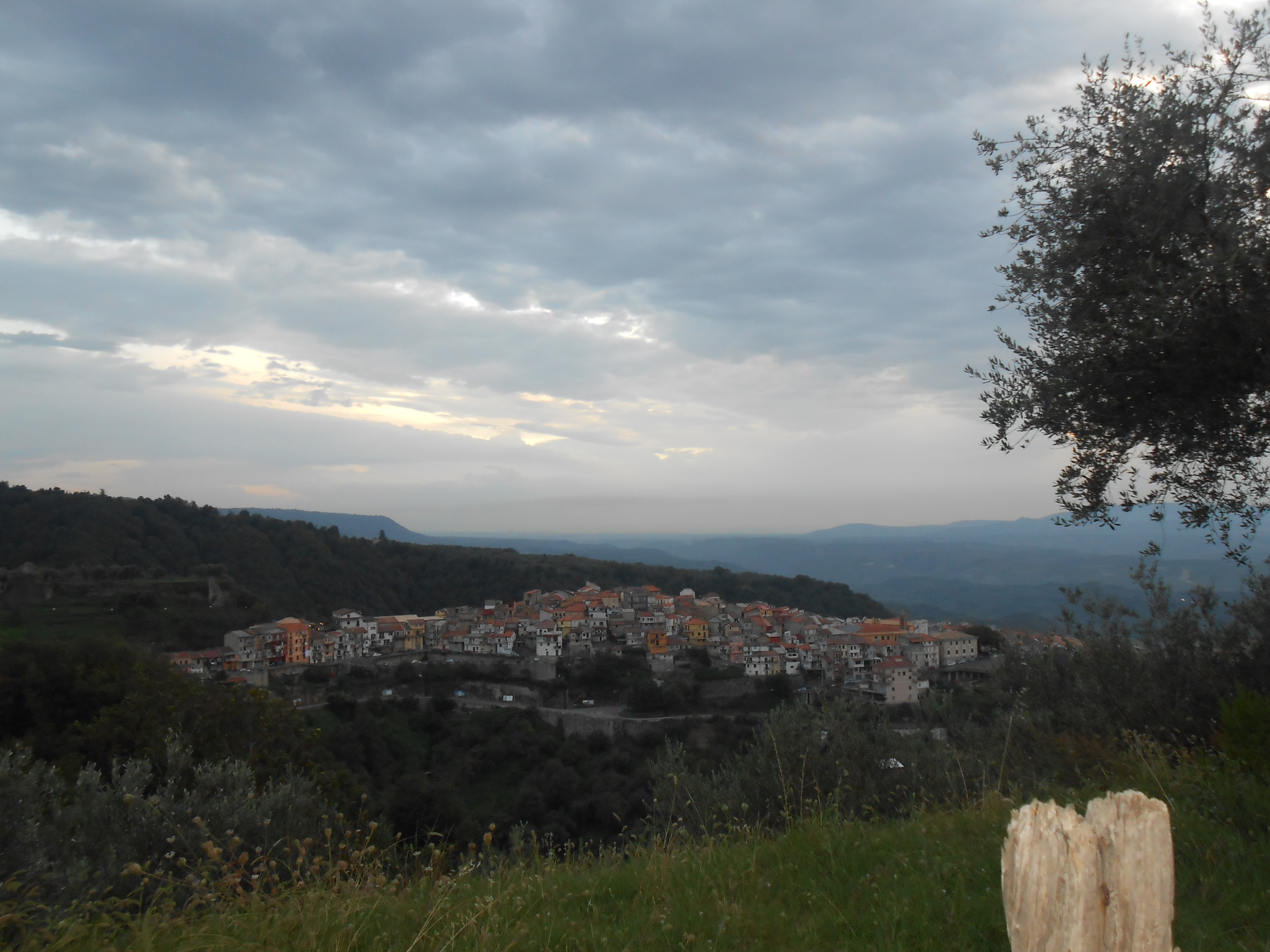 Arena (v.v.) Panorama (centro storico) Crepuscolo.